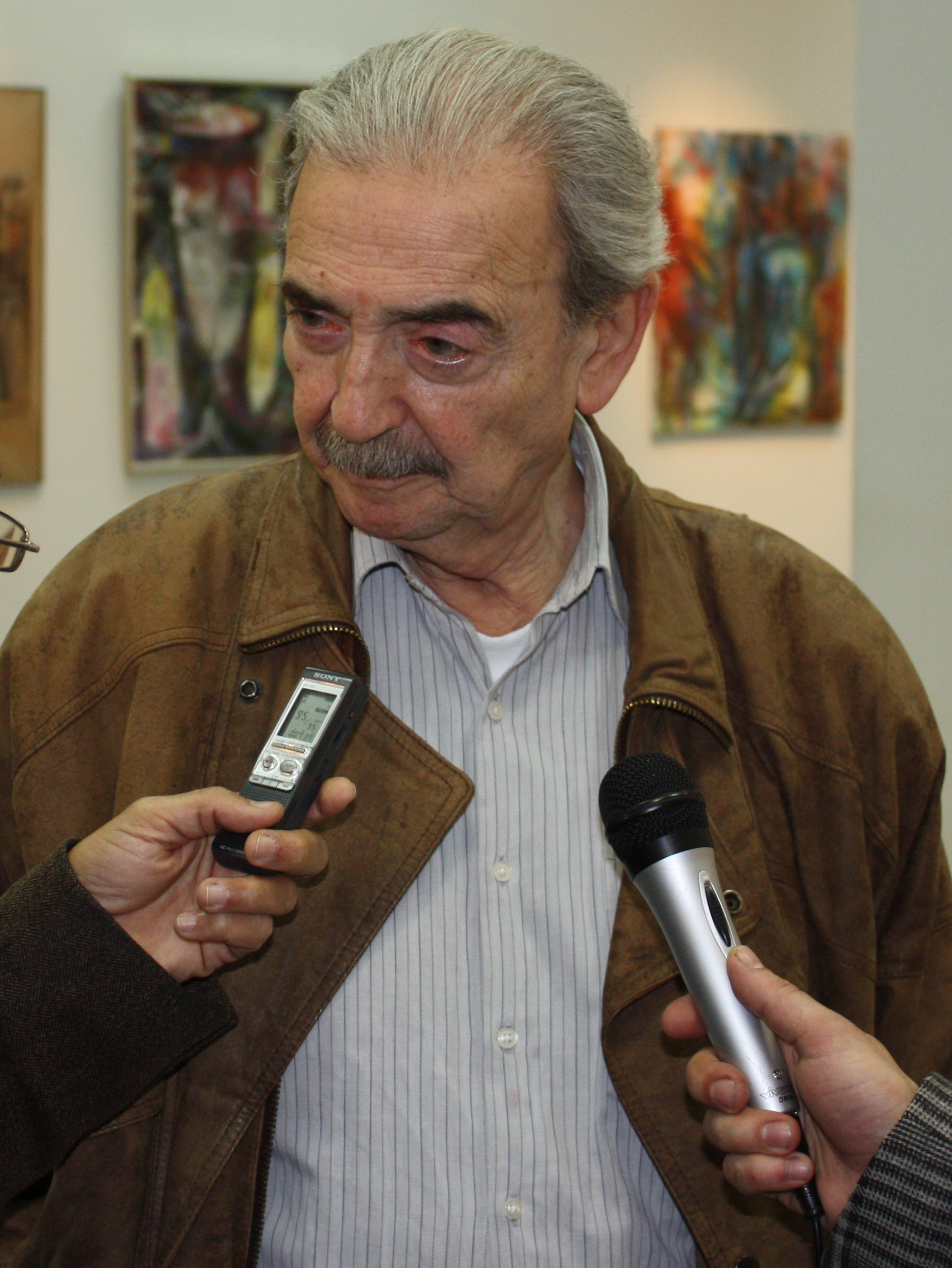 Хуан Хельман в Институте Сервантеса в Москве